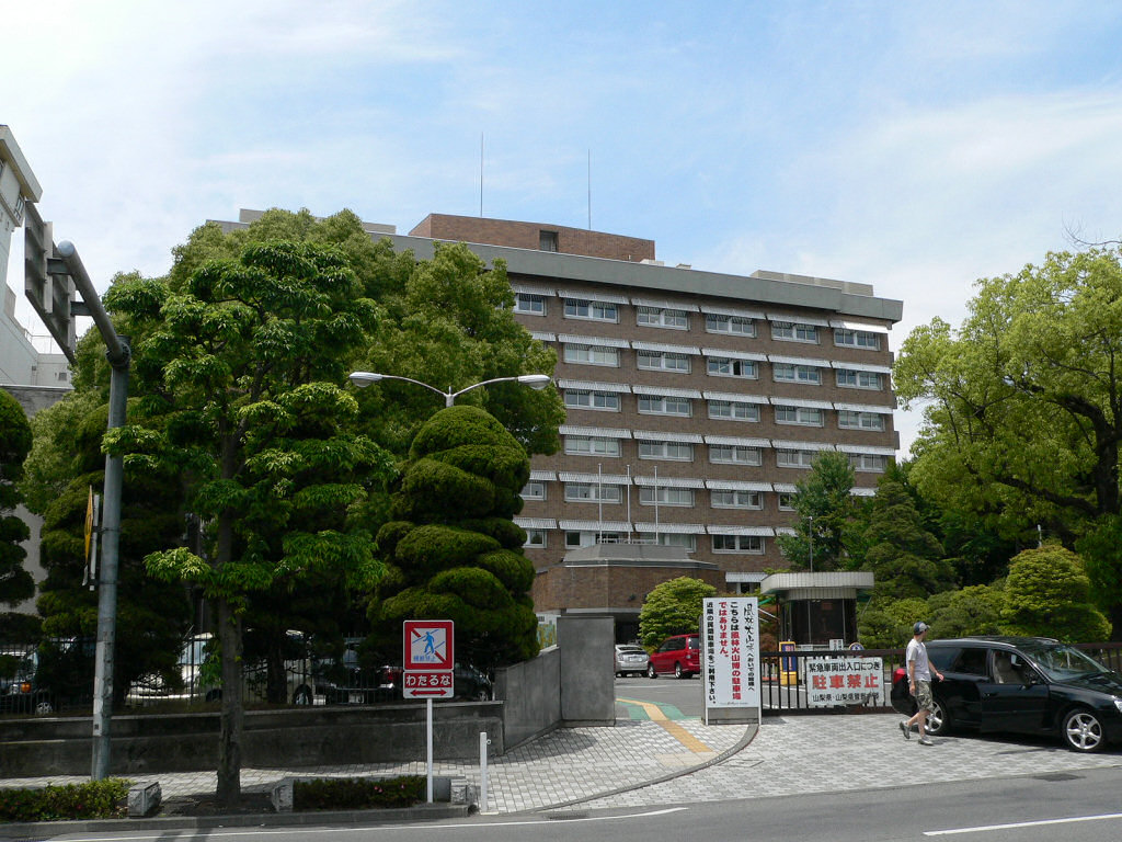 山梨県庁舎 2007年6月、自分で撮影